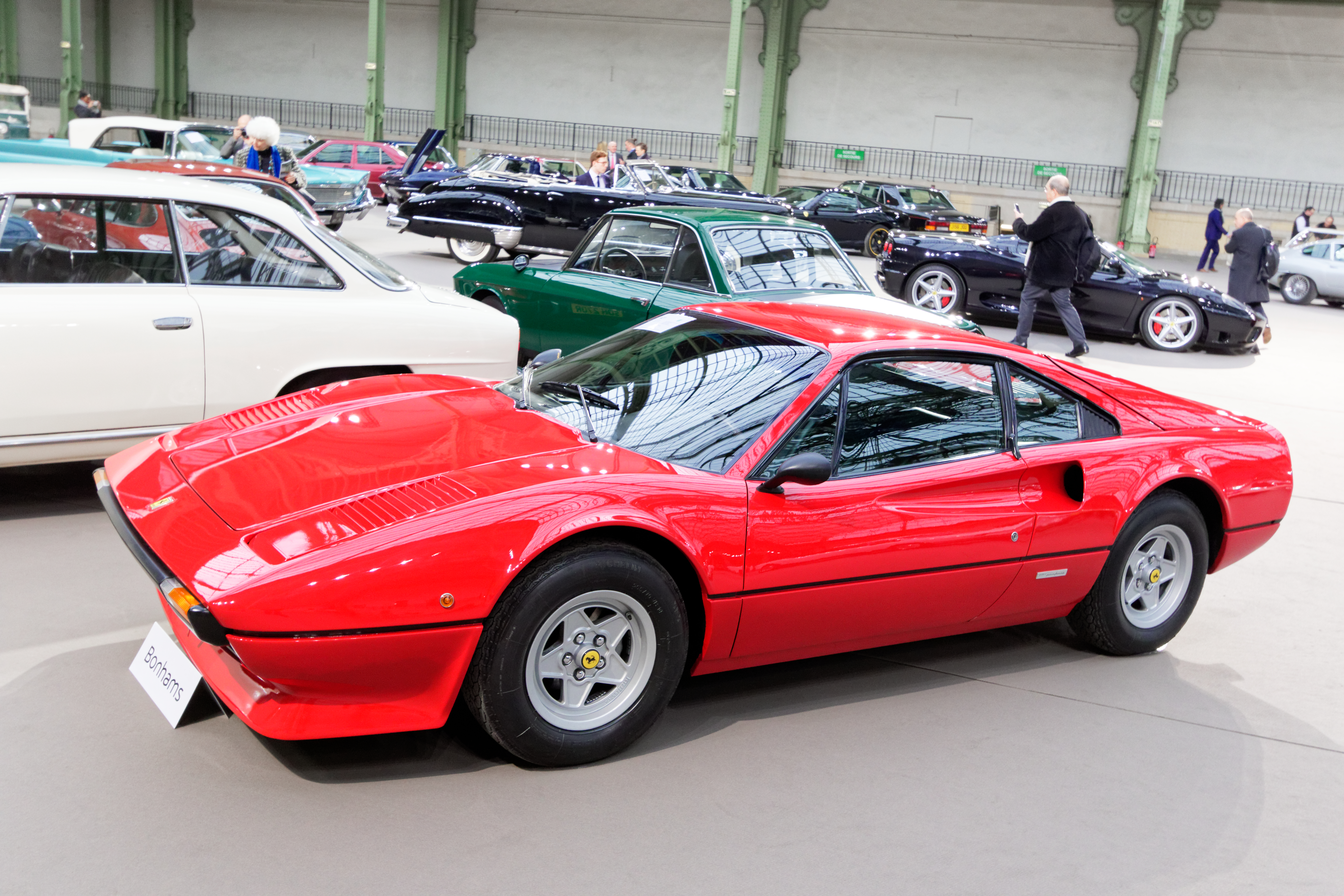 Un des véhicules présenté lors de la vente aux enchères Bonhams 2017 au Grand Palais de Paris.